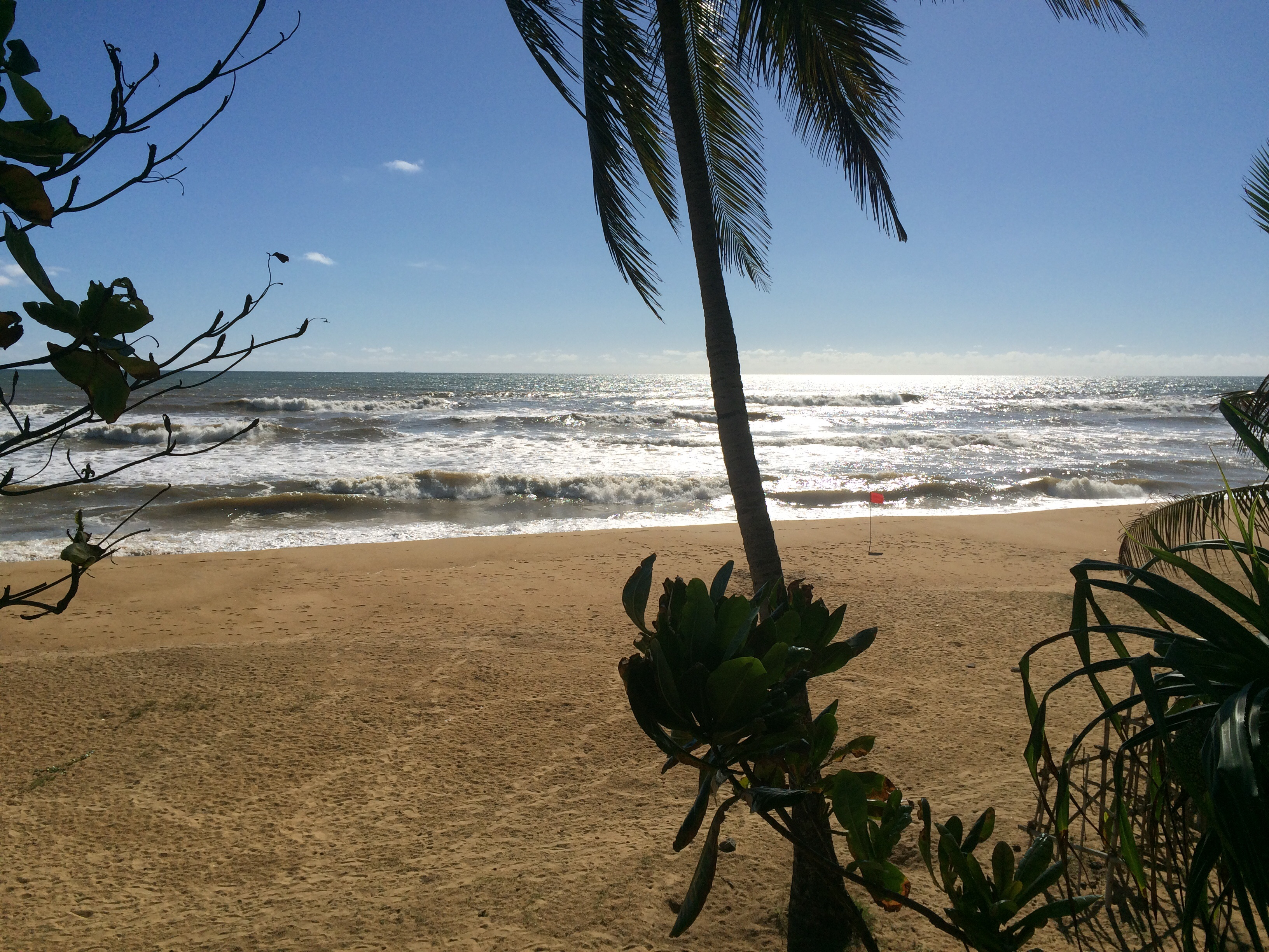 Katuneriya, Sri Lanka